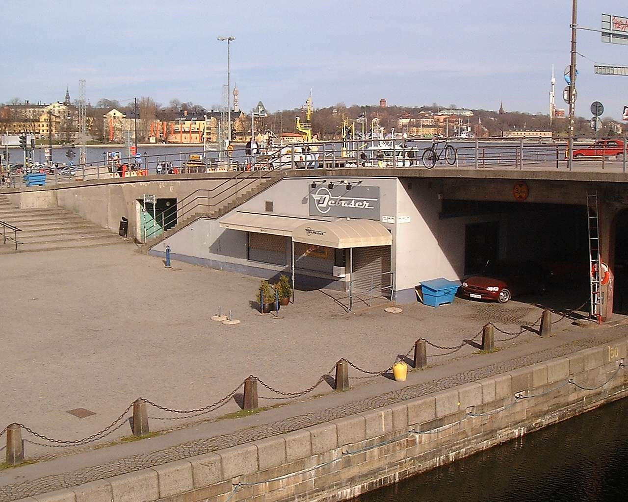 Rock club Debaser at Karl Johans Torg, Gamla stan, Stockholm.